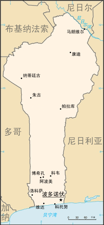 贝宁地图。